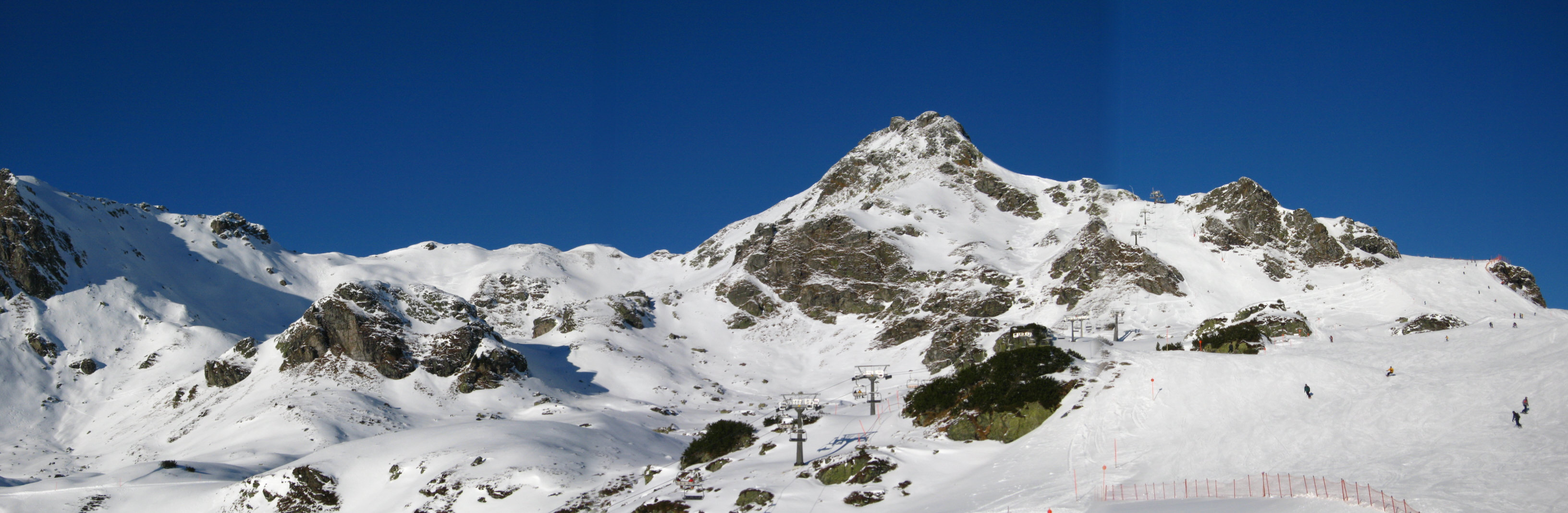 Panorama von Obertauern (Piste, Dez 06)